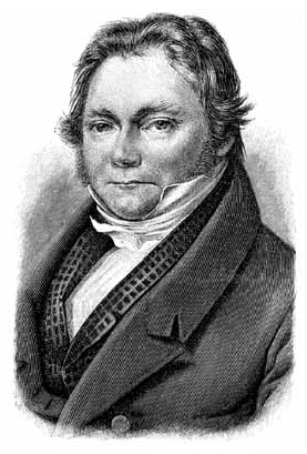 Jöns Jakob Berzelius